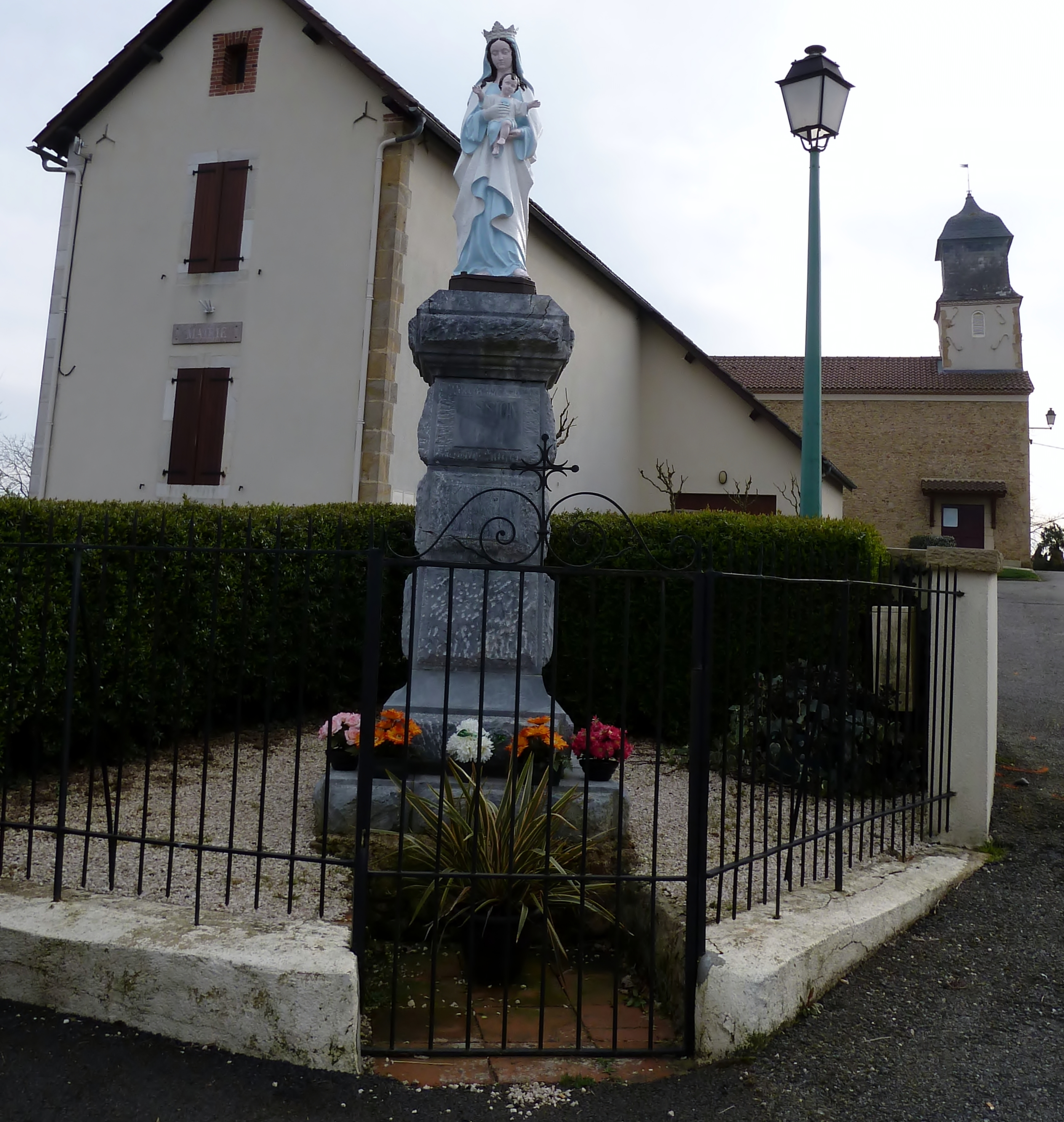 Un monument religieux de Moncla